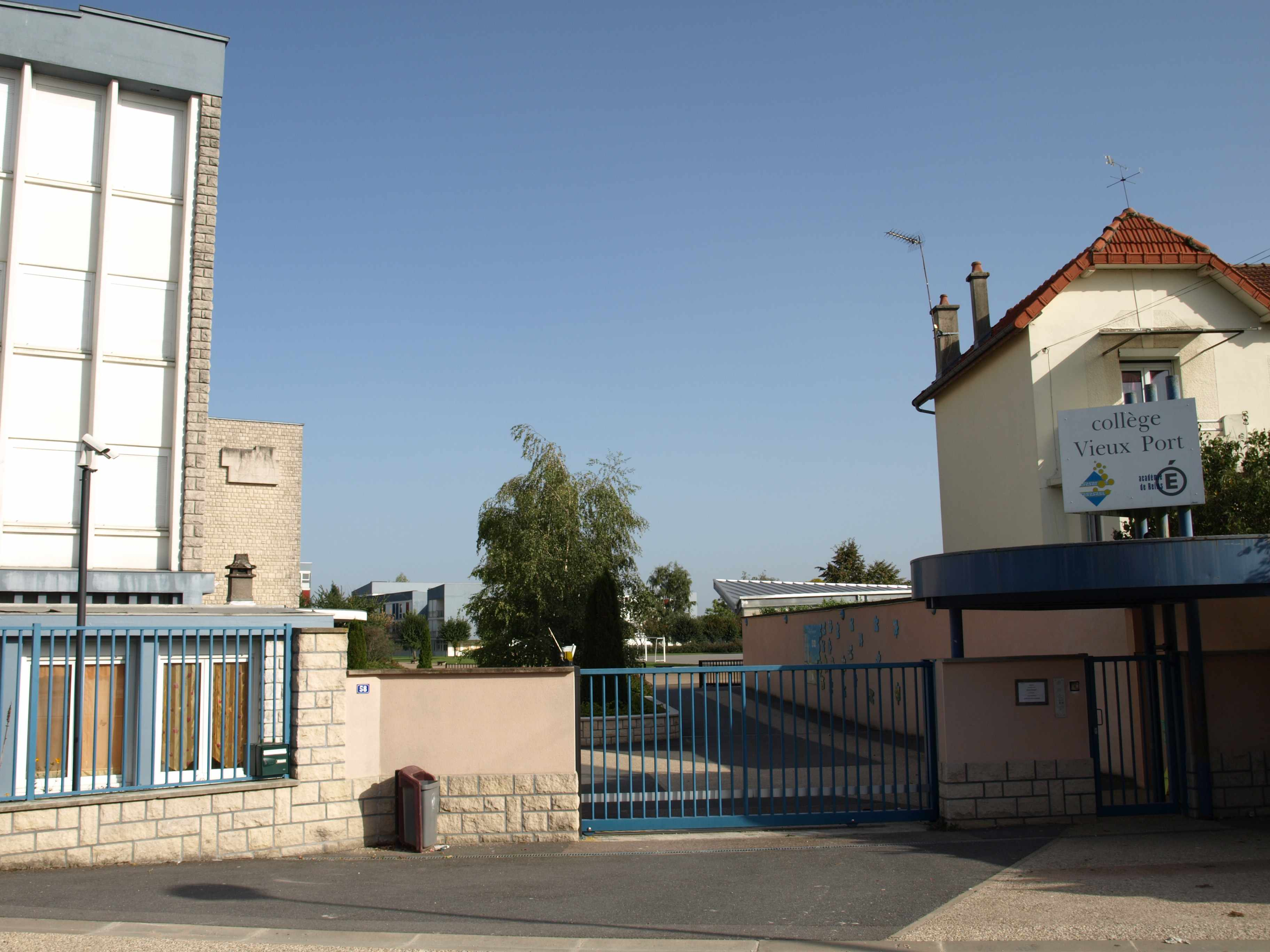 Vitry-le-François (51300 - FRANCE) : photographies Cité scolaire François Ier (entrée principale du collège du Vieux Port).